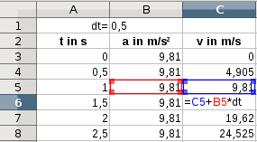 Einfache Simulation des freien Falls mit einer Tabellenkalkulation: Geschwindigkeitsberechnung.